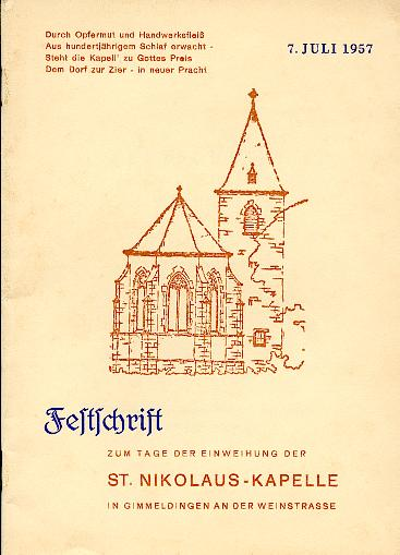 Bildbeschreibung: Titelseite der Festschrift zur Einweihung der Nikolauskirche (Gimmeldingen) 1957 Fotograf/Zeichner: Kirchenskizze aus dem Baugesuch Datum: 1957 (eingescannt durch Benutzer:Mundartpoet 2005) Sonstiges: Freigabe durch das zuständige Kath. Pfarramt Mußbach: Zustimmung zu Veröffentlichung in Wikipedia Als der für die Filialkirche St. Nikolaus zuständige Pfarrer vertrete ich die Katholische Kirchenstiftung St. Nikolaus Gimmeldingen. Die "Festschrift zum Tage der Einweihung der St.Nikolaus-Kapelle in Gimmeldingen an der Weinstrasse" wurde am 7. Juli 1957 von der Katholischen Kirchenstiftung St. Nikolaus Gimmeldingen herausgegeben. Die Kirchenstiftung besitzt sämtliche Rechte an der Festschrift hinsichtlich Text und Abbildungen. Namens der Katholischen Kirchenstiftung St. Nikolaus Gimmeldingen gebe ich die Abbildung der Titelseite frei für die Veröffentlichung in Wikipedia nach GNU-Lizenz ( Neustadt, den 15. März 2006 Michael Hergl, Pfarrer